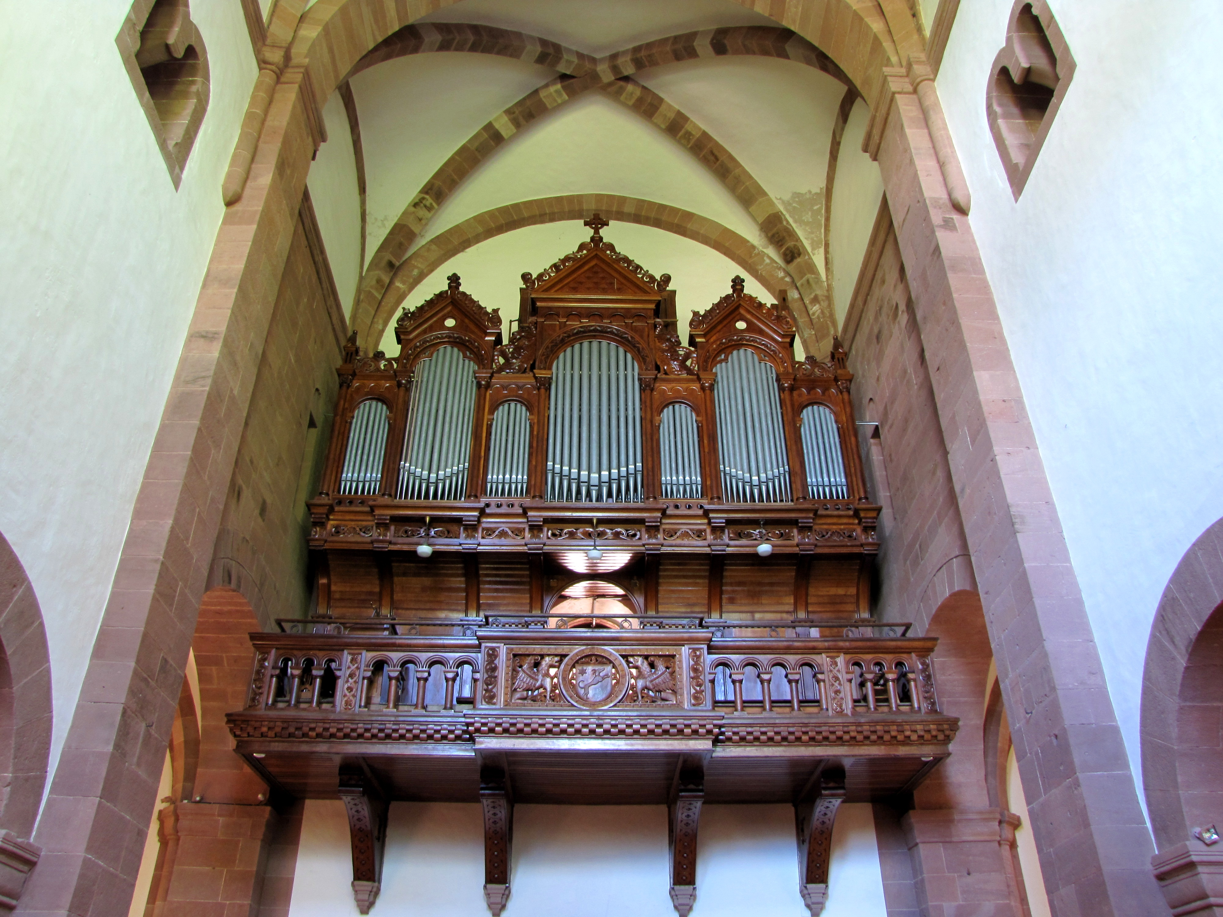 Alsace, Haut-Rhin, Église abbatiale Saint-Léger (XIIe) de Murbach (PA00085554, IA00054802, IA00054801).Orgue Rinckenbach-Boehm (1906): This object is classé Monument Historique in the base Palissy, database of the French furniture patrimony of the French ministry of culture, under the references PM68000909, buffet PM68000725 buffet and instrument PM68000724 instrument.